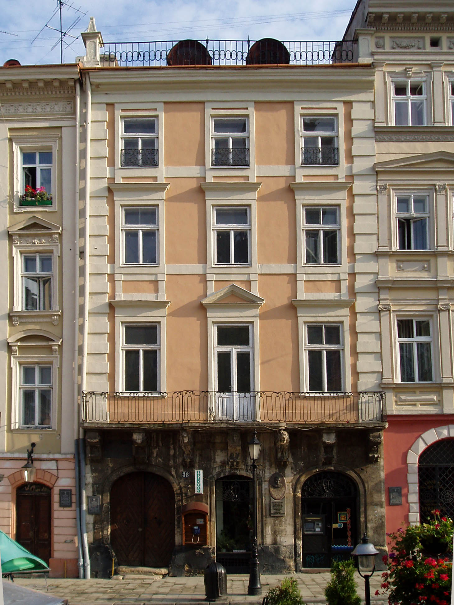 Будинок № 36 на Площі Ринок у Львові